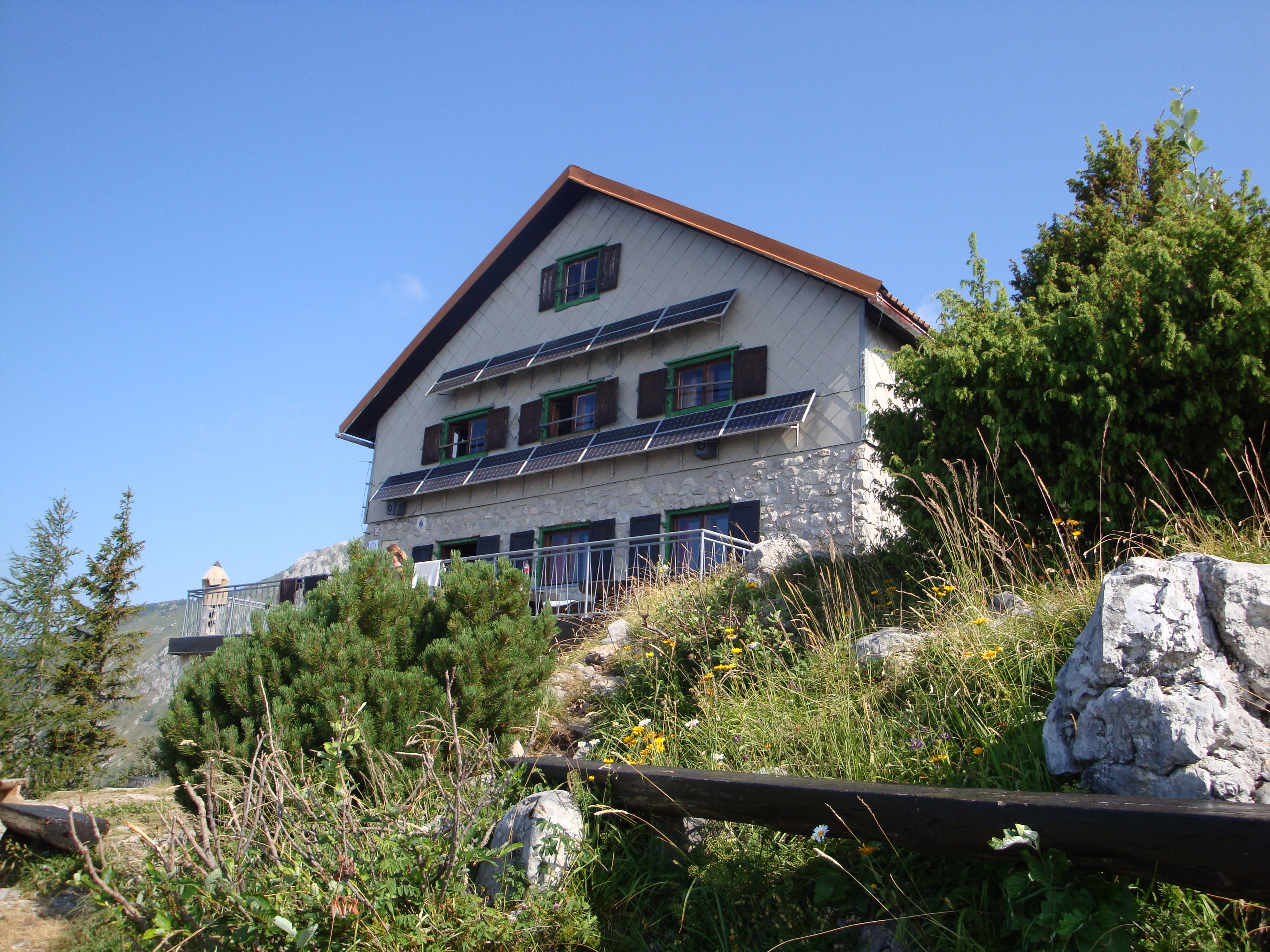 Planinski dom na Kališču, Slovenija.